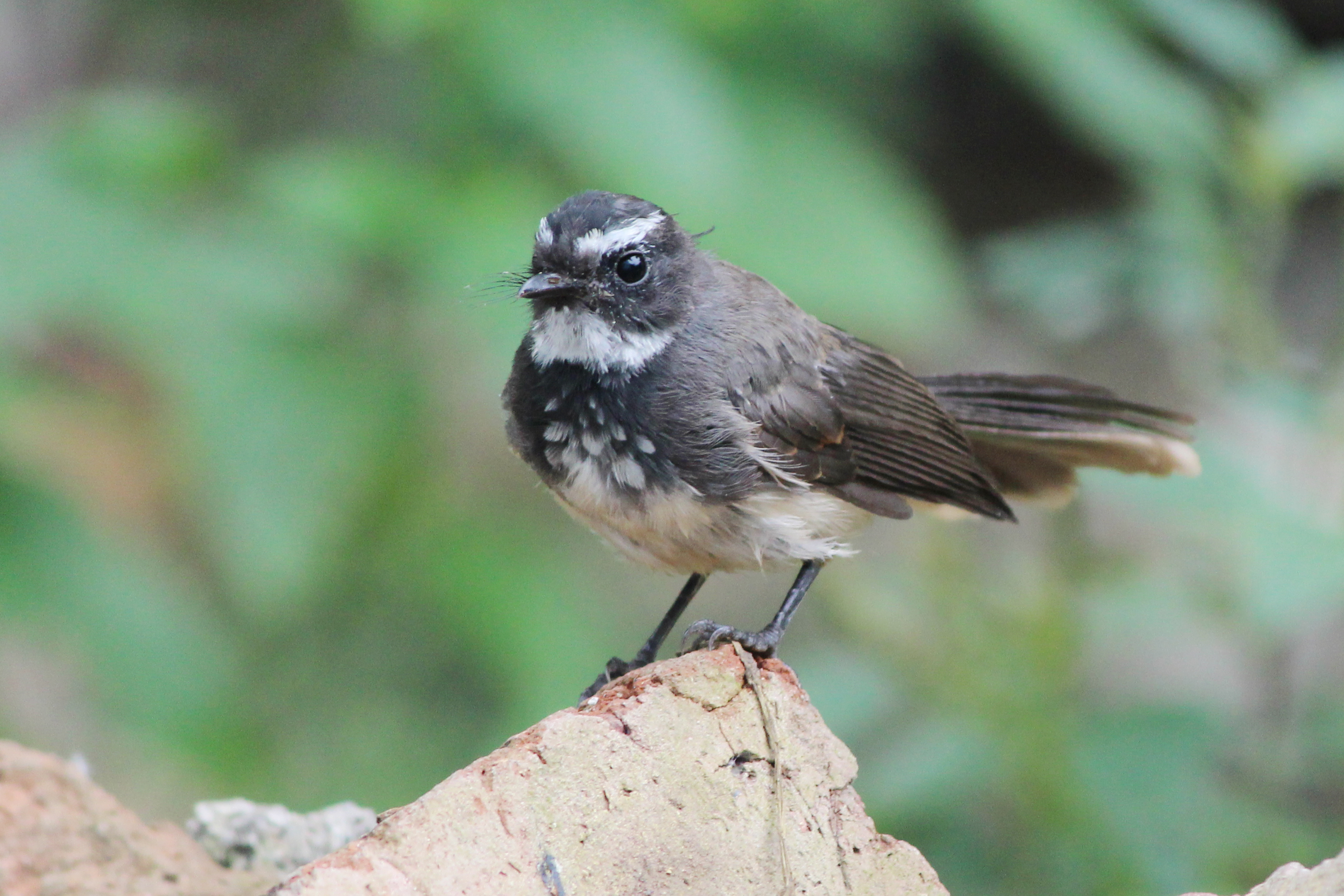 नाचरा मक्षाद White spotted Fantail Flycatcher, Spot-breasted fantail शास्त्रीय नाव: Rhipidura albogularis भारत, थायलंड व व्हियेतनाम या देशात आढळणारा हा पक्षी आहे. भारतात, राजस्थान,मध्यप्रदेश, ओरिसा, आंध्रप्रदेश, महाराष्ट्र इत्यादी राज्यात आढळतो. नाचरा हा पक्षी महाराष्ट्रात सर्वत्र आढळतो. याला अनेक नावाने संबोधले जाते. नाचण, नर्तक, न्हावी ही त्याला प्रचलित नावे आहेत. परंतु नाचरा किंवा नर्तक म्हणून त्याला जास्त प्रमाणावर ओळखले जाते. चिमणीसारखा हा दिसणारा पक्षी असून याची शेपटी वर उचललेली असते. शेपूट लांब व पिसारलेल्या अवस्थेत असते. डोक्यावर रांगोळी काढावी तशा पांढऱ्या रेषा असतात. सतत हालचाल करणारा हा पक्षी आपल्या शेपटाची पिसे हवा घेण्याच्या जपानी पंख्यासारखी पसरलेली असतात. गाणे गात-गात आपली शेपटी बंद - उघडी करत असतो. यामुळेच त्याला इंग्रजीमध्ये फॅनटेल म्हणतात. अशावेळी शेपटीच्या पंखांवर छानशी नक्षी पहावयास मिळते. तो एका जागेवर कधीच जास्तवेळ स्थिर बसलेला दिसत नाही. सतत हालचाल करत इकडून तिकडे उड्या मारत असतो. नर्तक अतिशय सुंदर नृत्य करत असतो आणि त्याचबरोबर त्याचे मंजुळ गाणे चालूच असते. काही वेळा चक-चक असा आवाज देखील काढत असतो. झाडा-झुडपात माश्या व किडे पकडून खाण्यासाठी तो सतत उड्या मारत असतो. तो सर्व प्रकारच्या माशा, डास, किडे पकडून खात असतो, त्यामुळे याला माशापकड्या म्हणूनही ओळखला जातो. तो सर्व म्हणून याला ‘नाचरा’ म्हणतात. नर्तक हा रंगाने चिमणीसारखा दिसणारा असतो. गळ्यावर, पोटावर, आणि डोक्यावर पांढरे पट्टे असतात. याची लांबी साधरण १२ ते २१ सेंटीमीटर इतकी असते. शरीर पूर्ण काळे नसते तर किंचित तपकिरी आणि राखी रंगाचे असते. पोटाचा, मानेचा रंग पांढरा असतो. डोक्यावर रांगोळीने काढाव्या अशा तीन चार रेषा असतात. भुवया देखील पांढऱ्या रंगाच्या असतात. याचा विणीचा हंगाम असतो मार्च ते ऑगस्ट. झाडाच्या फांद्यांच्या खाचांमध्ये घरटे बांधतो. गवत, काड्या, धागे जमवून हा पक्षी वाटीसारखे घरटे बांधतो. बाहेरून मात्र कोळीष्टके लावलेली असतात. मादी बहुदा २ ते ३ अंडी घालते.